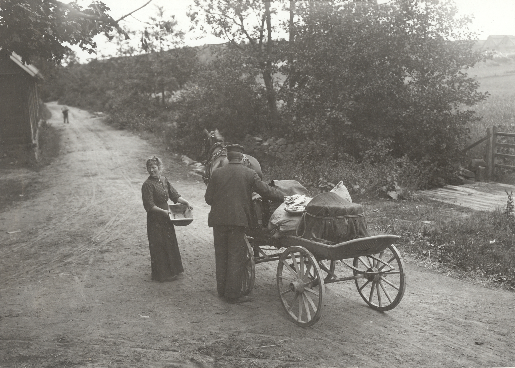 Strömmingshandel på landsvägen. Blekinge, Östra härad, Jämjö socken, Hallarum.